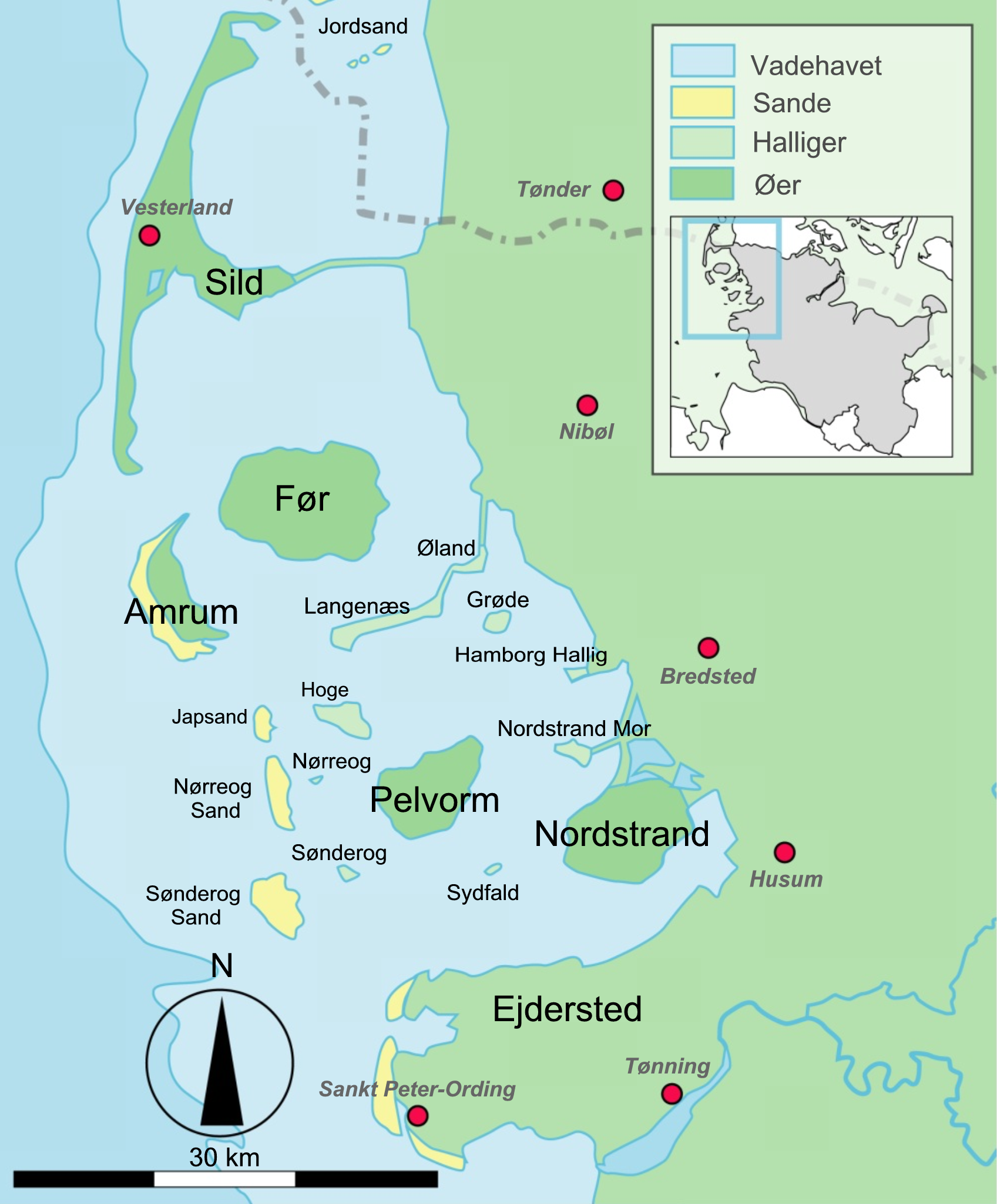 Neugezeichnete Version der nordfriesischen Inseln (deutscher Teil); Beltringharder Koog korrigiert, mit dänischen Bezeichnungen versehen